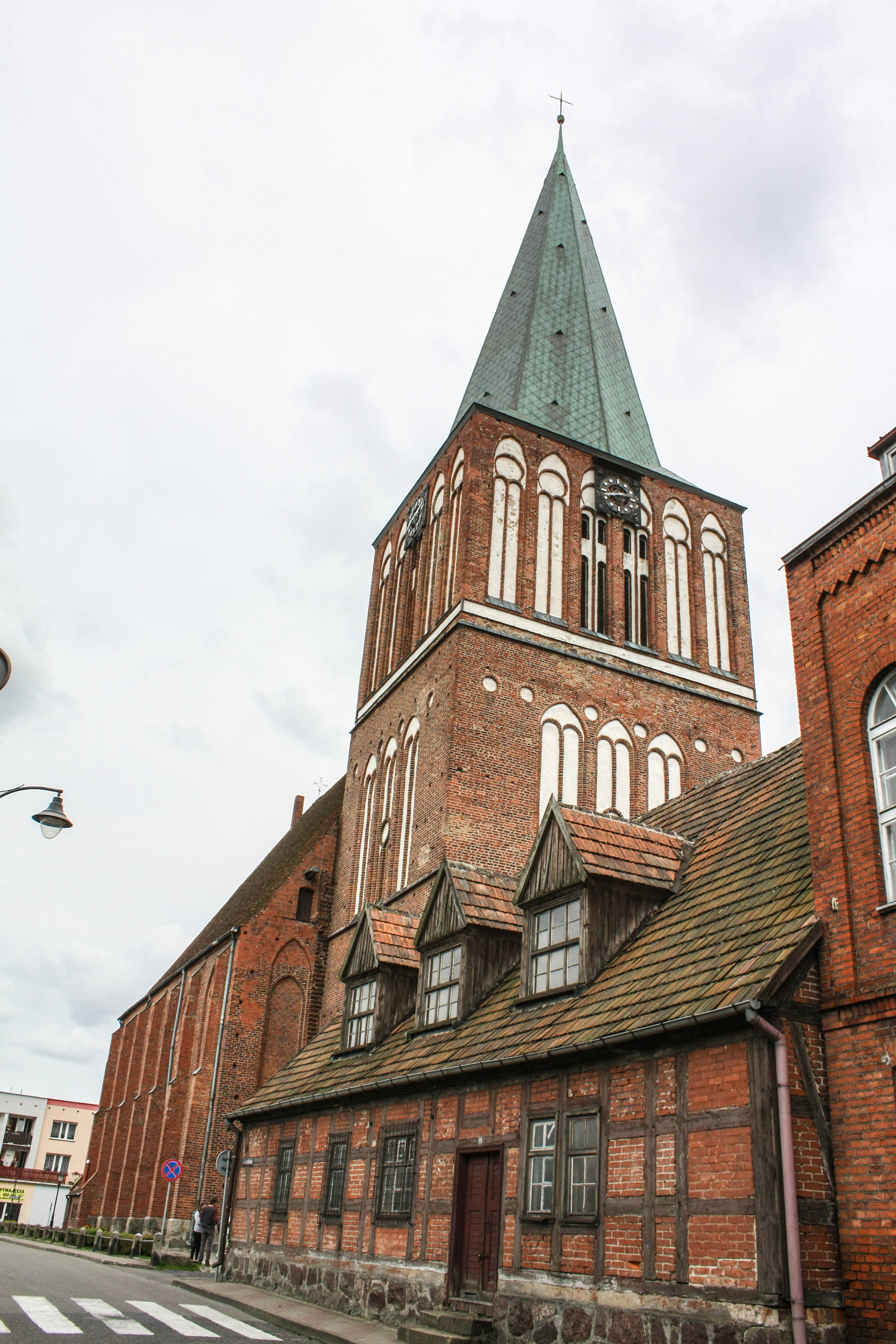 Drawsko Pomorskie, kościół par. p.w. Zmartwychwstania Pańskiego, XIV/XV, XIX